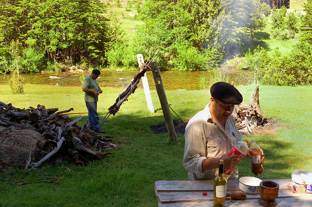 El maestro a cargo prepara su mezcla especial de "chimichurri", un preparado de vinagre, aceite, hierbas y especias